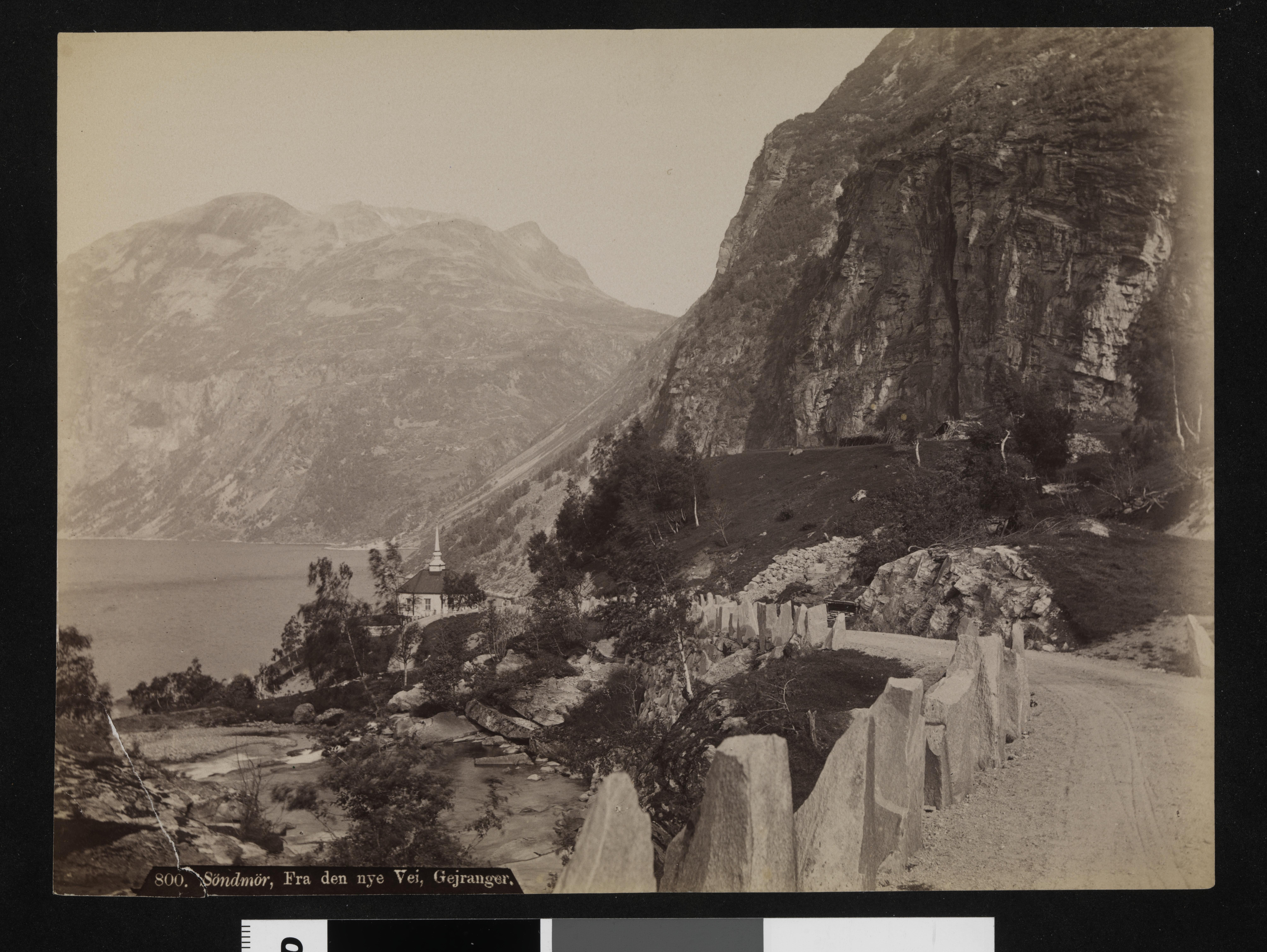 Bildet er hentet fra Nasjonalbibliotekets bildesamling Stranda, Møre og Romsdal